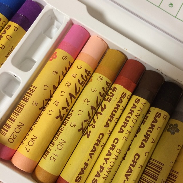 No.7 Usu-daidai's old name is Hada-iro.